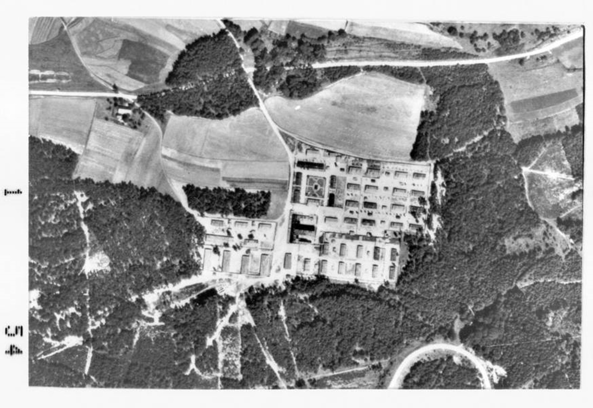 Luftaufnahme des Lagers Wolfstein bei Neumarkt in der Oberpfalz